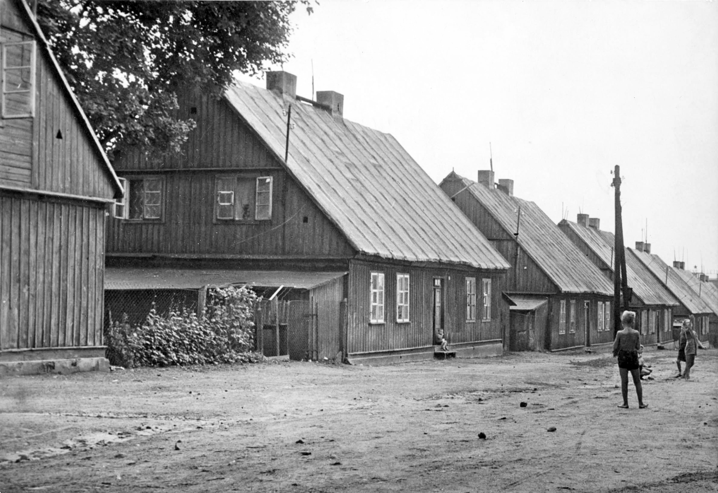 Fotografia Ignacego Płażewskiego prawdopodobnie przedstawiająca drewniane domy na Widzewie. Osiedle z tzw. „domami kunitzerowskimi” powstało jako odpowiedź na pilną potrzebę mieszkaniową dla oddalonej od centrum miasta manufaktury bawełnianej, której właścicielem był m. in. Juliusz Kunitzer. W porównaniu z domami robotniczymi na Księżym Młynie czy Wodnym Rynku ich standard był niski. W jednym domu mieszkało średnio 6 rodzin robotniczych. Formą przypominały domy rzemieślnicze z pierwszej połowy XIX wieku. W 1900 r. osiedle liczyło ok. 150 domów drewnianych i 8 murowanych położonych przede wszystkim przy ulicy Niciarnianej, Kunitzera (ob. część ul Niciarnianej), Józefa oraz po obu stronach Szosy Rokicińskiej (ob. al. Marszałka J. Piłsudskiego). Większość domów drewnianych została rozebrana po 1945 r., część jednak przetrwała do lat 60., a nawet 70. XX wieku, kiedy to na ich miejsce zostały wybudowane bloki z wielkiej płyty. Przed rozbiórką pojawił się pomysł zachowania ich i przeniesienia do skansenu, nie został on jednak zrealizowany – ówczesne władze nie chciały „upamiętniać” reliktów agresywnego kapitalizmu XIX wieku.